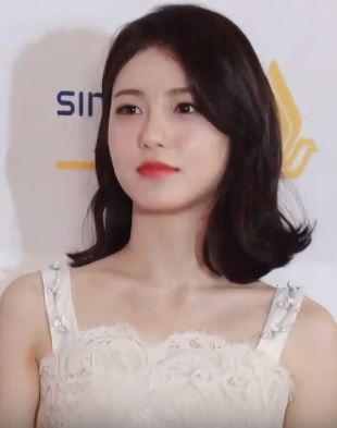 ’2019 올해의 브랜드 대상 시상식’ 레드카펫이 24일 오후 서울 중구 장충동 신라호텔 다이너스티홀에서 진행됐다.